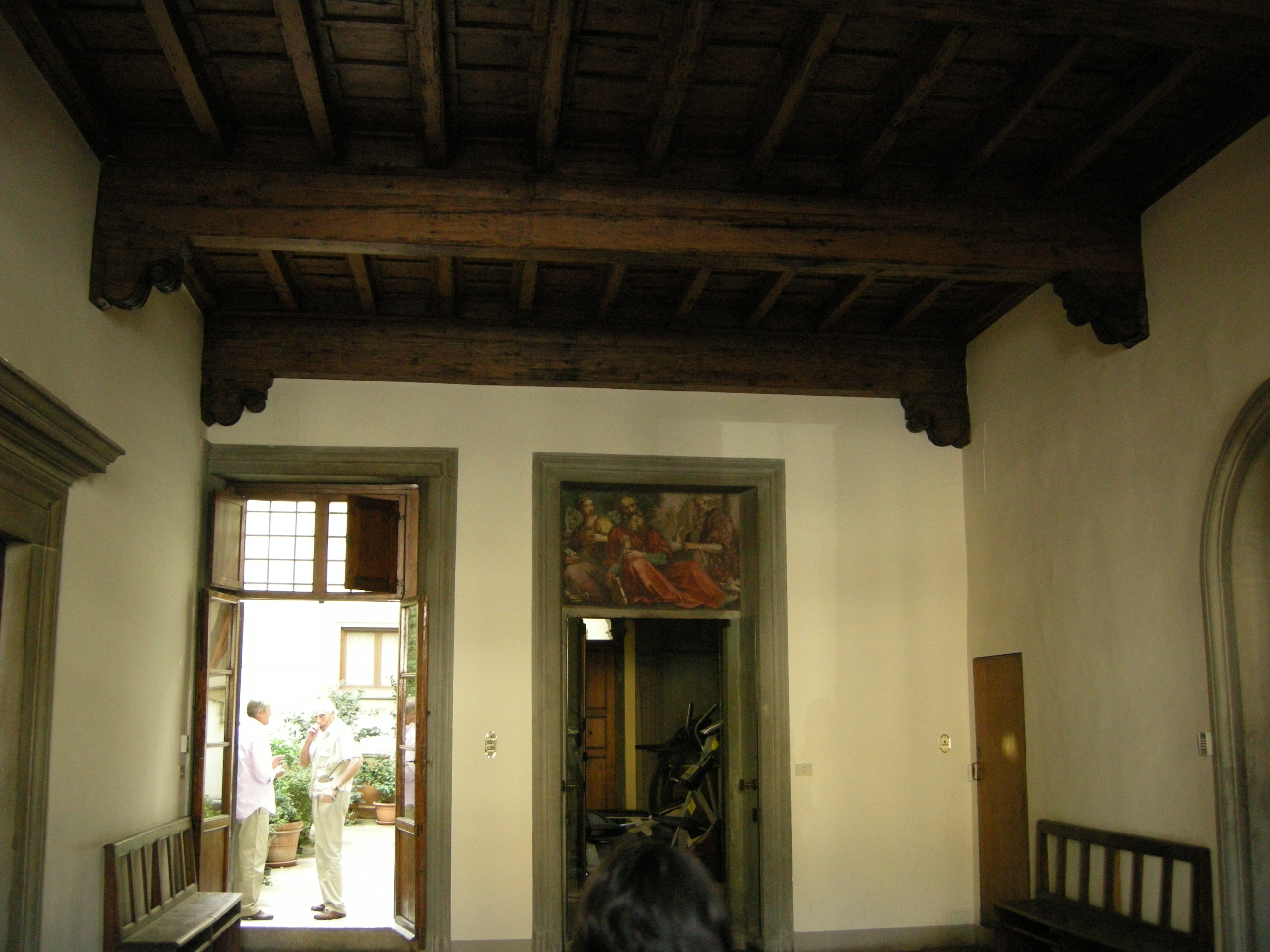 Palazzo dell'antella, atrio